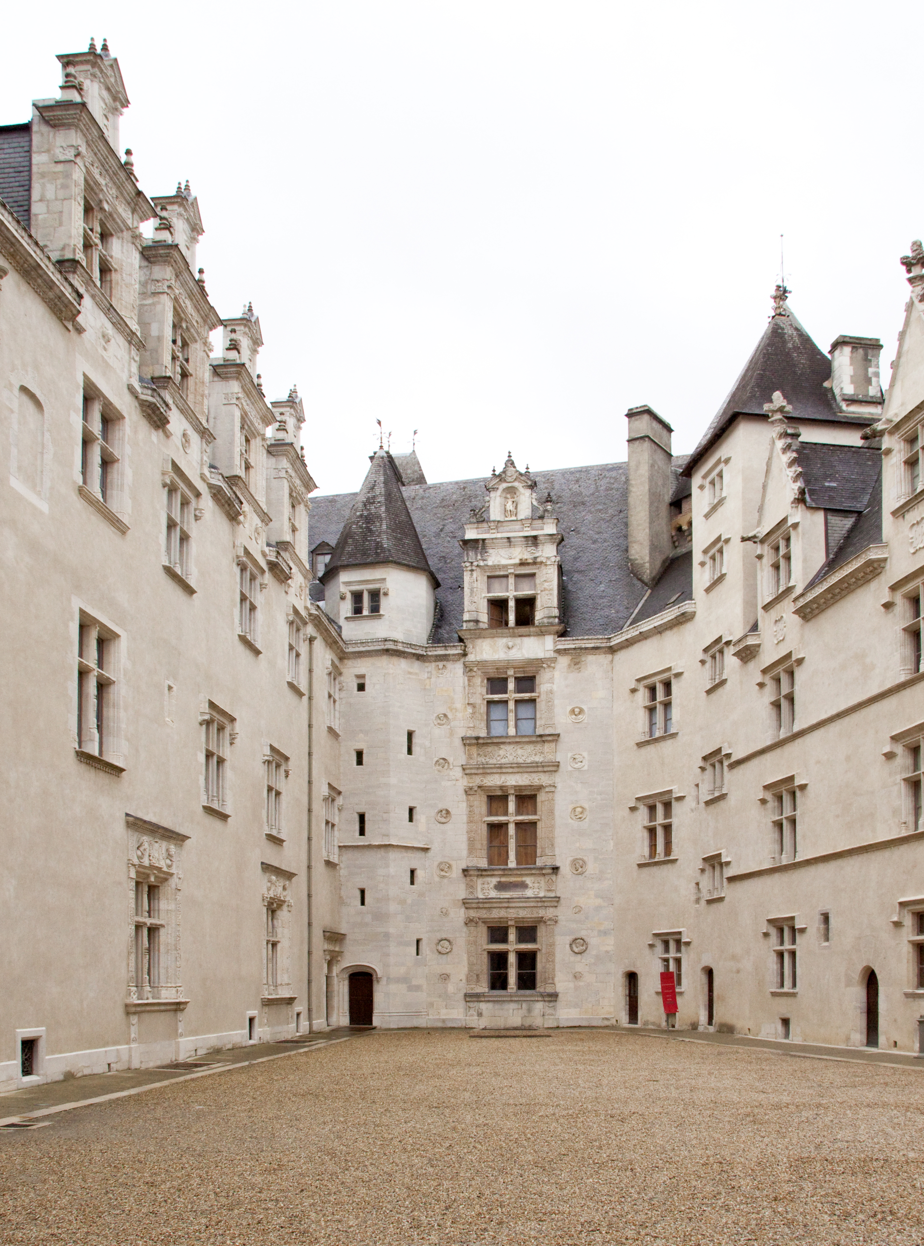 Cour du château de Pau (Pyrénées-Atlantiques, France)